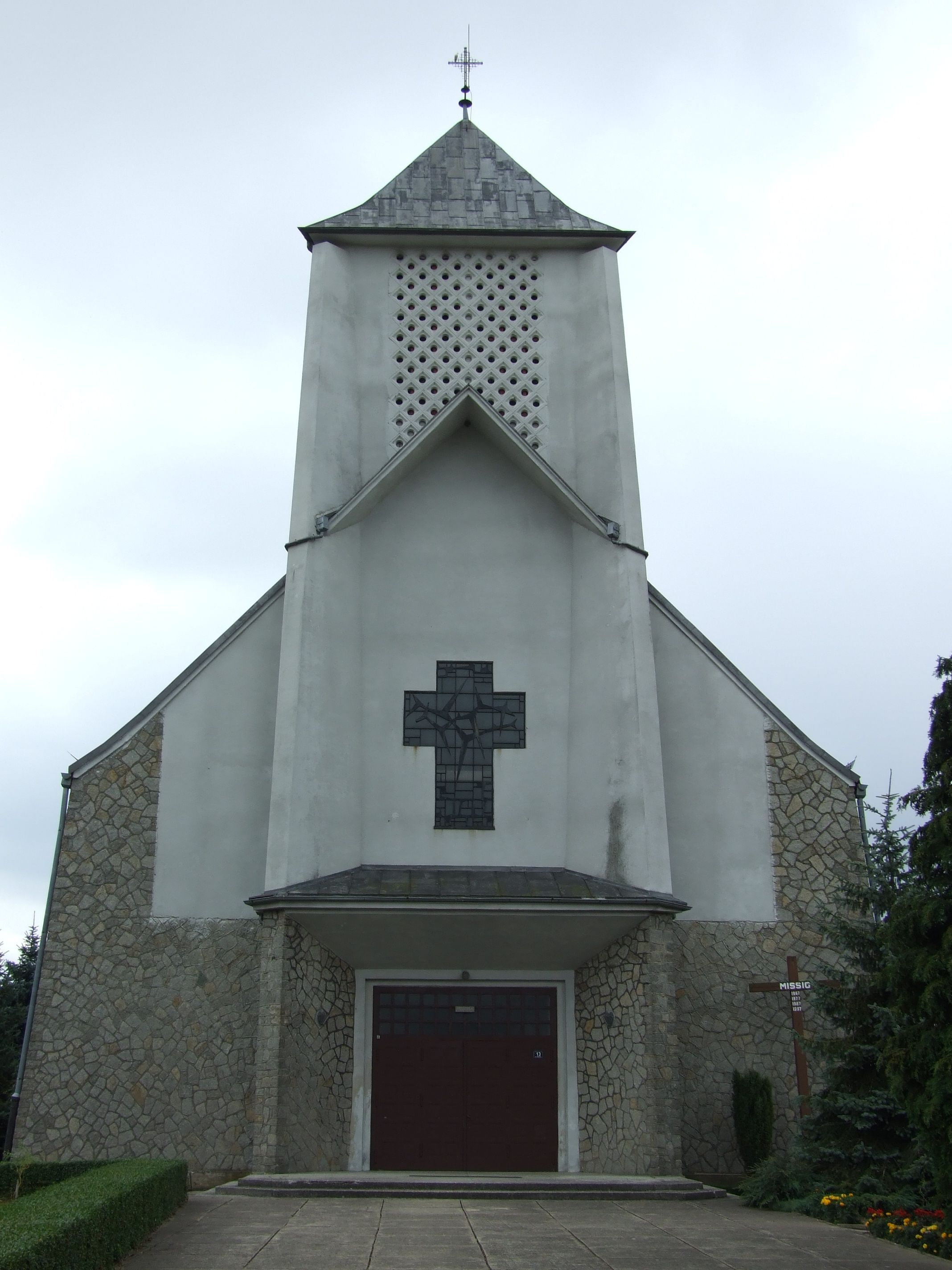 Kościół parafialny w Sowczycach